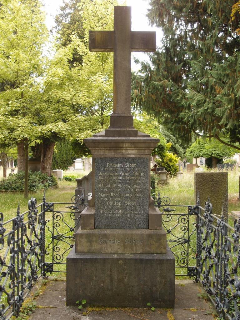 Grab des Frauen- und Badearztes Hugo Stöhr (1830-1901) auf dem Kapellenfriedhof in Bad Kissingen